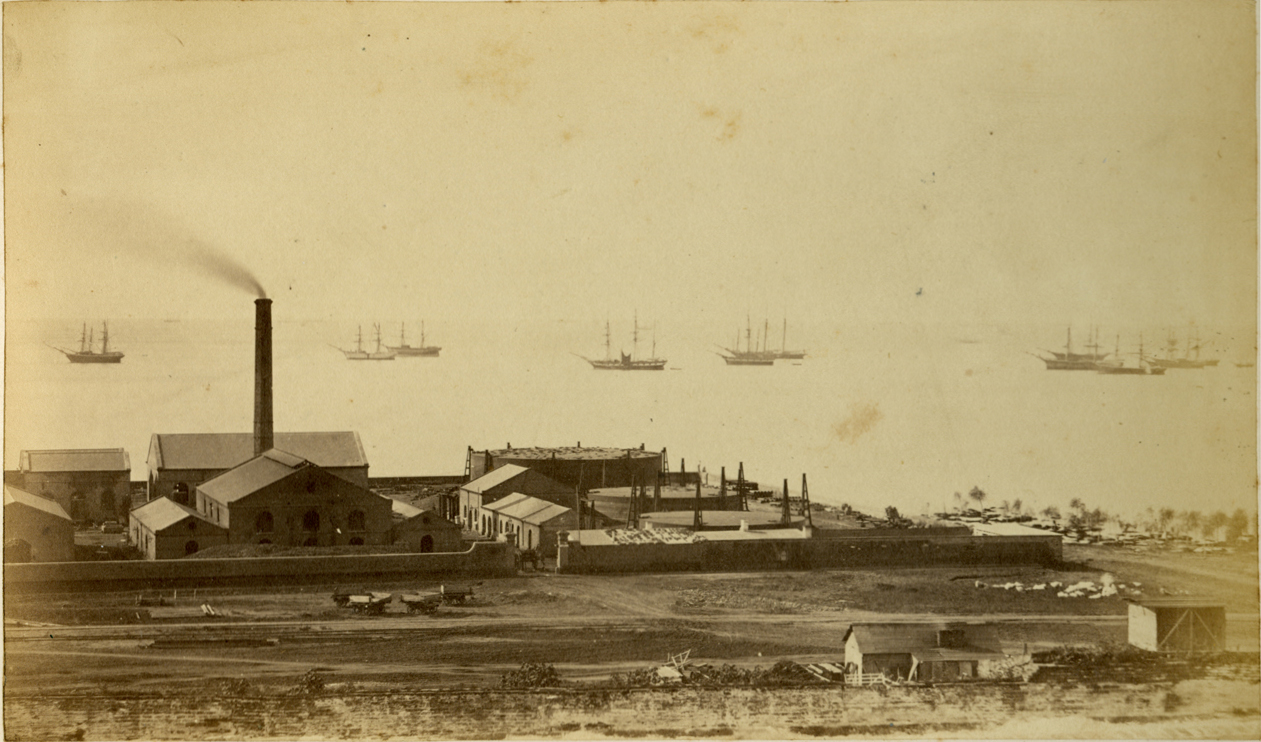 rimera fábrica de gas instalada en Buenos Aires en el año 1853; combustible usado en el alumbrado público y doméstico. Sobre el Río de la Plata se perfilan varios navíos a vela. En primer plano vías de la cercana terminal del ferrocarril del Norte. En el extremo derecho, lavanderas trabajando en las toscas del río y palmeras.